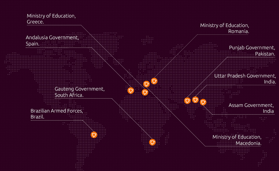 Government